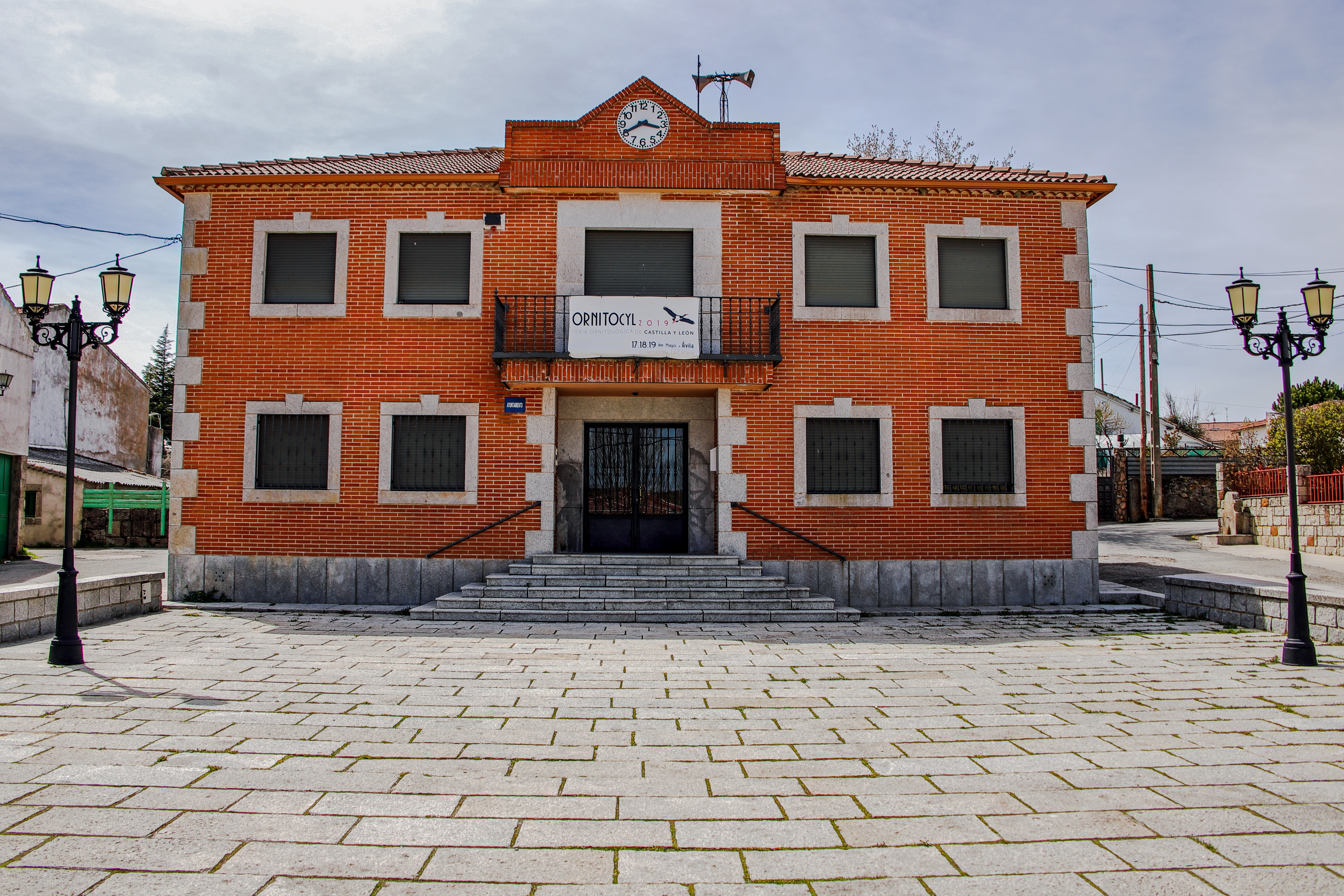 La Cañada es una localidad que pertenece al municipio de Herrandón de Pinaeres en la comarca de Ávila, provincia de Ávila.